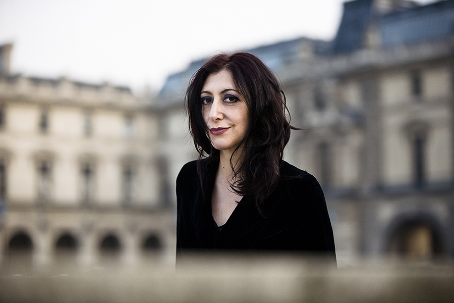 Monica Nappo